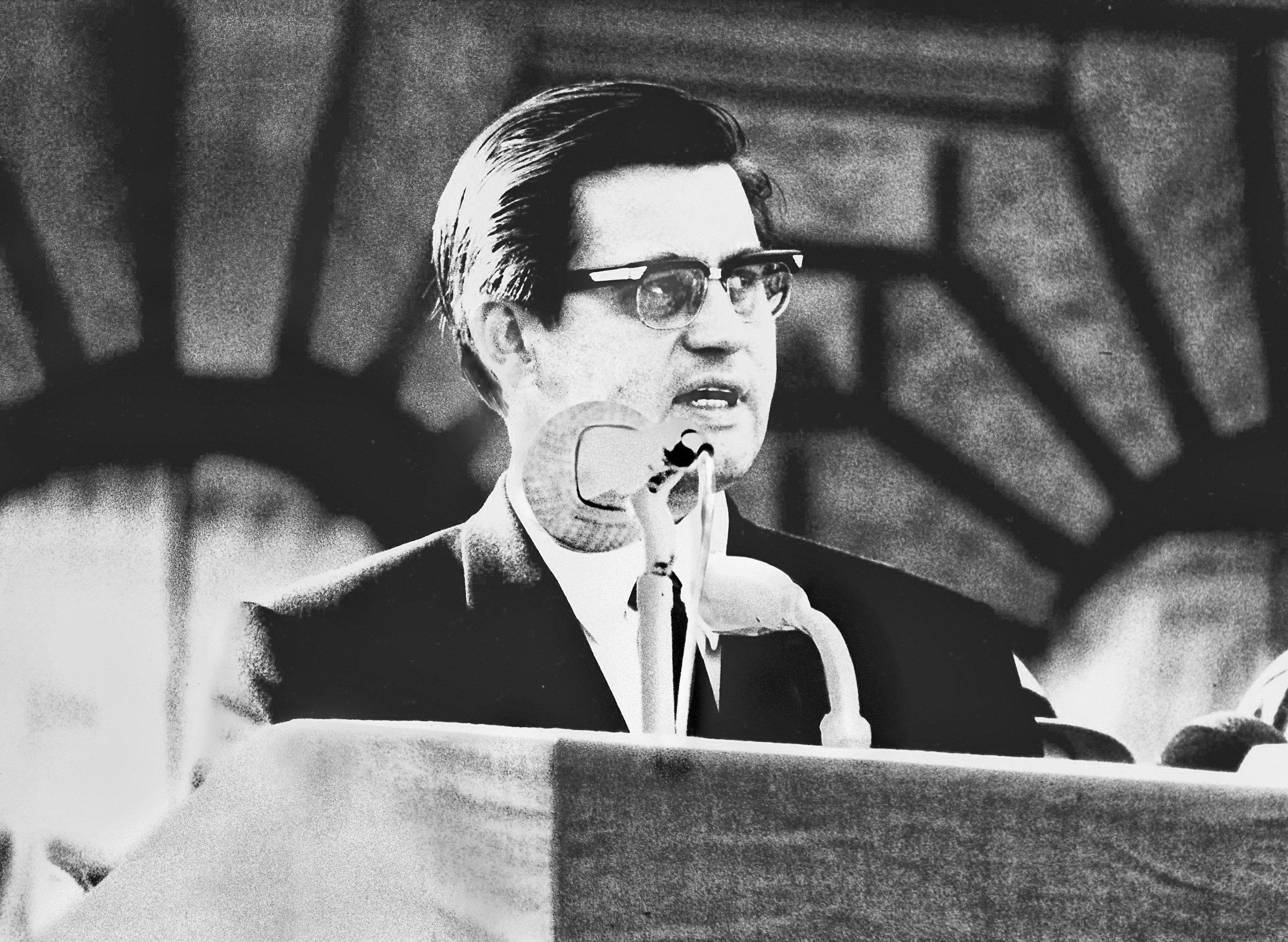 Hans Koschnik 1968